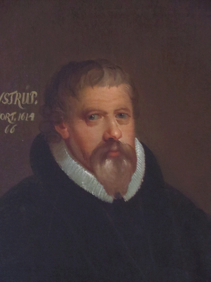 Peder Jensen Winstrup (1549-1614), biskop, maleri fra omkring 1750'erne, koromgangen i Roskilde Domkirke, Sjælland